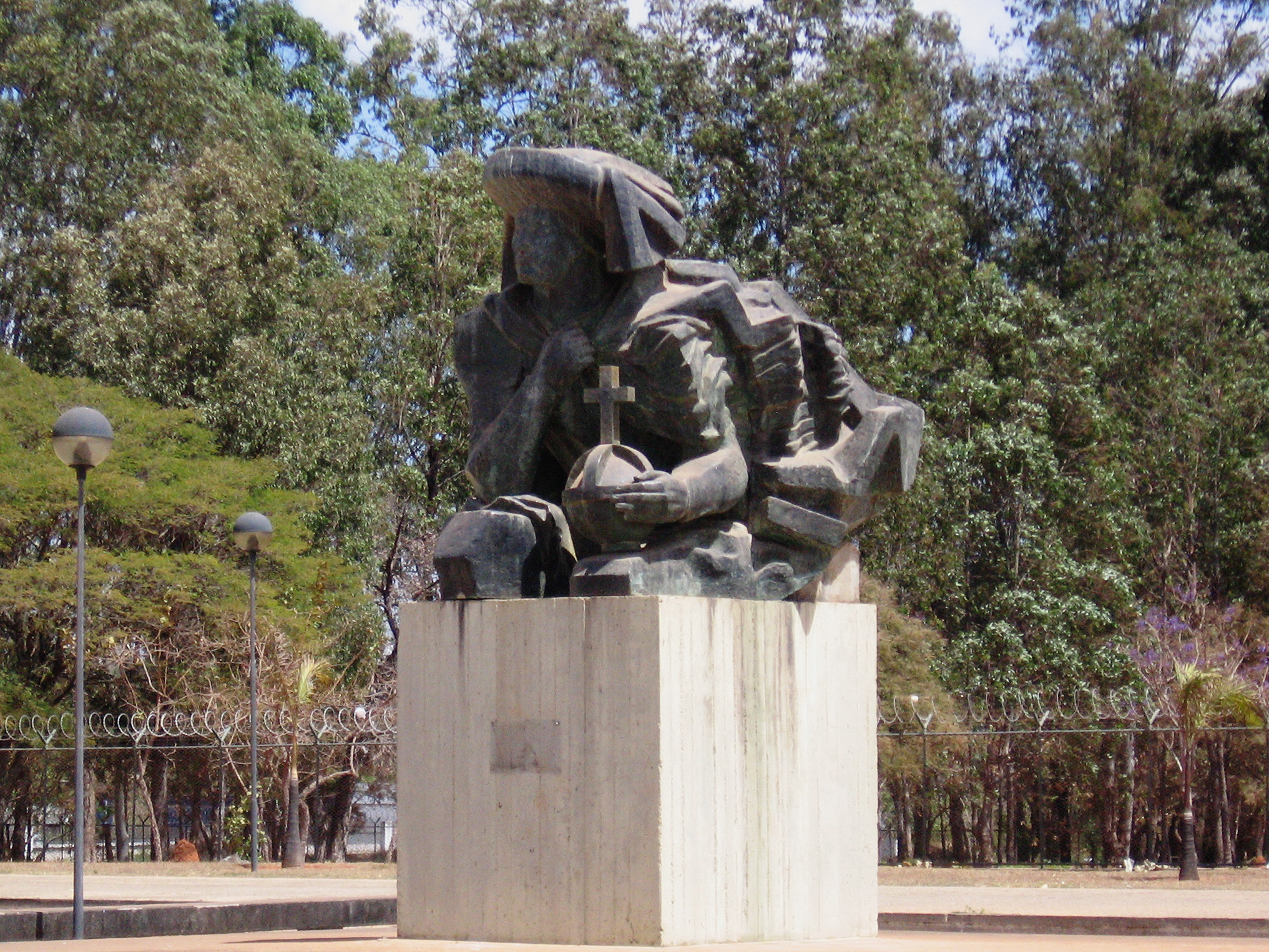 Salvador Barata Feyo, Monumento ao Infante D. Henrique, 1956, bronze; Praça Portugal, Brasília